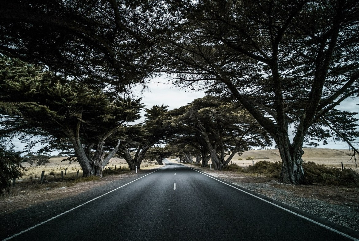 Шоссе в Австралии